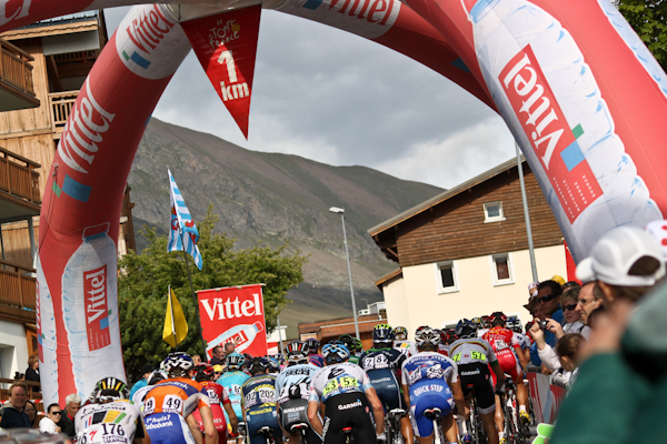 Le grupetto sous la Flamme Rouge